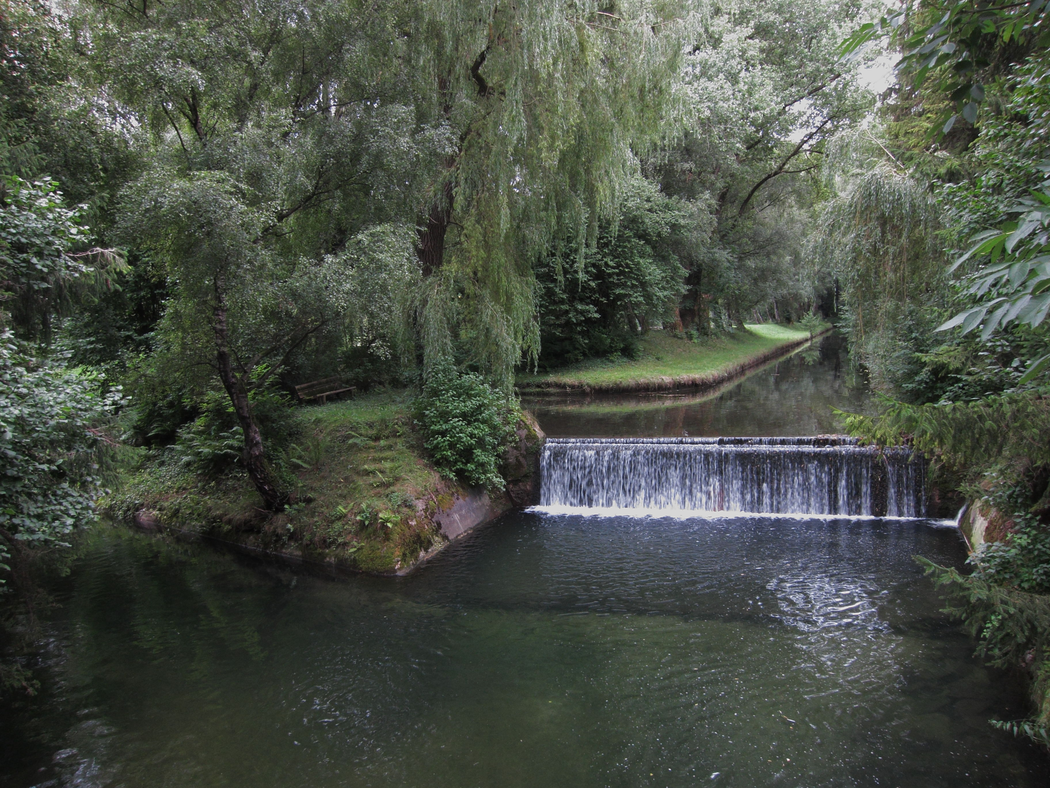 Betriebsgelände der ehem. Hammerschmiede und Elektrizitätswerk F. X. Meiller, Ottenhofen, seit 1888 an der Sempt.